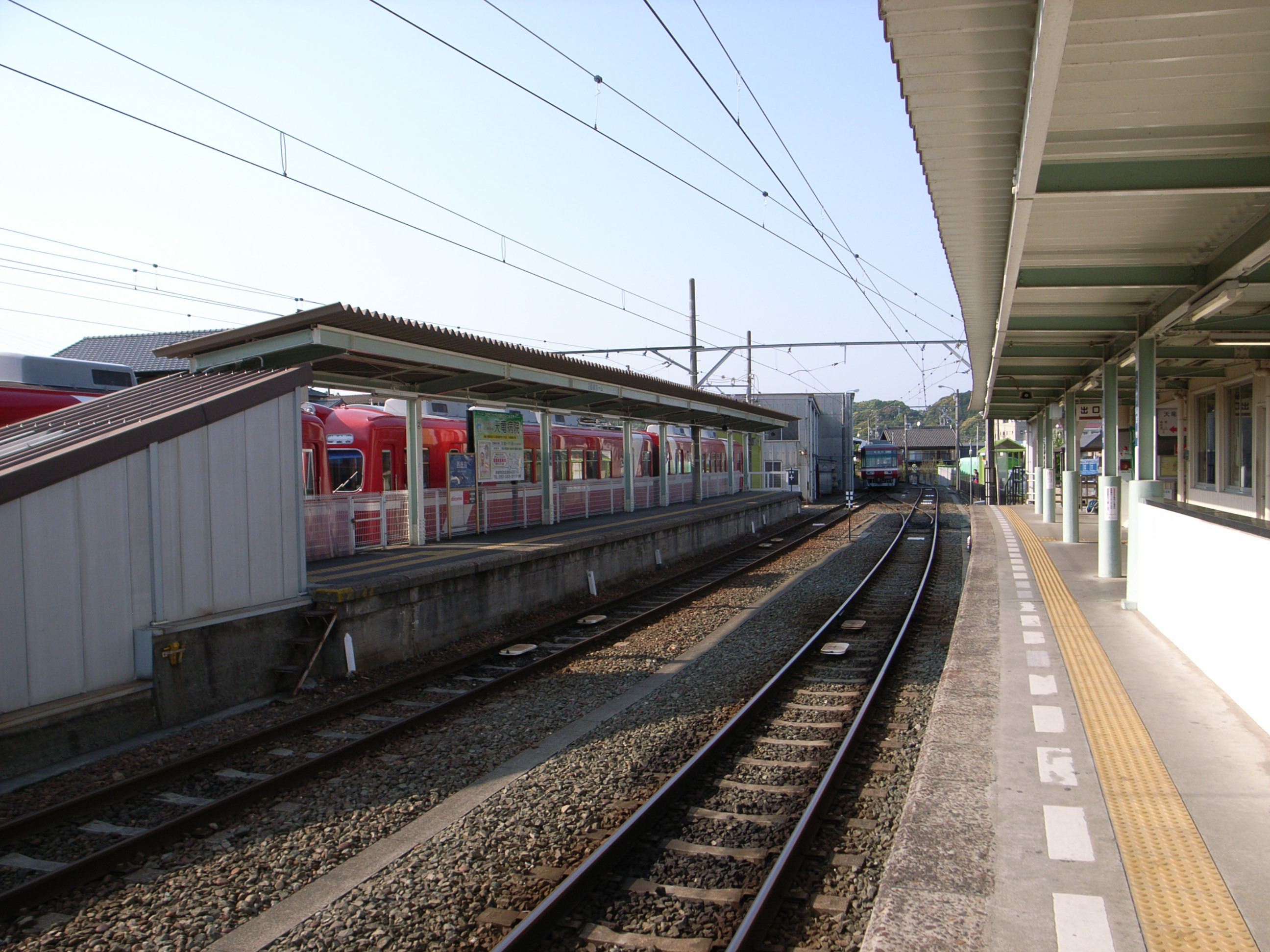 西鹿島駅 遠州鉄道線 プラットホーム